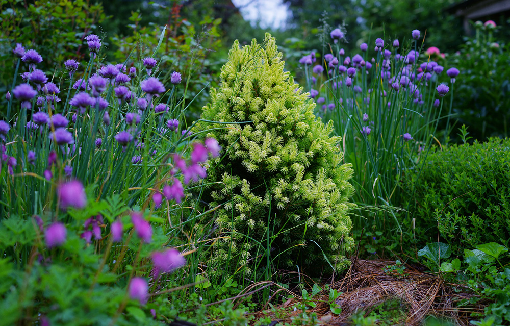 Россия, Владимирская область, частный сад